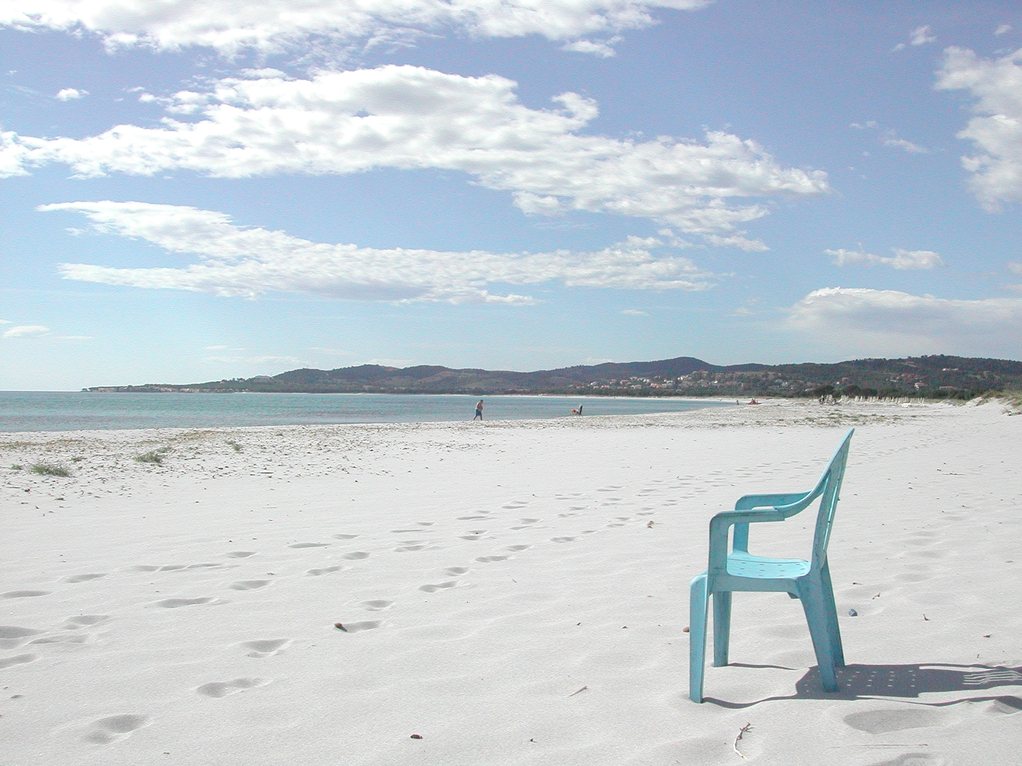 La bellissima spiaggia di La Caletta (Siniscola-Nuoro-Sardegna)